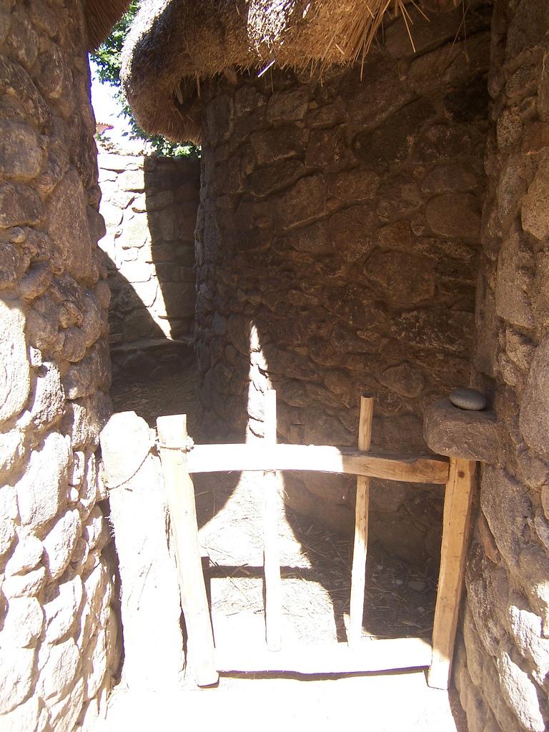 Zona de corrales entre las viviendas recreadas de O Castro.